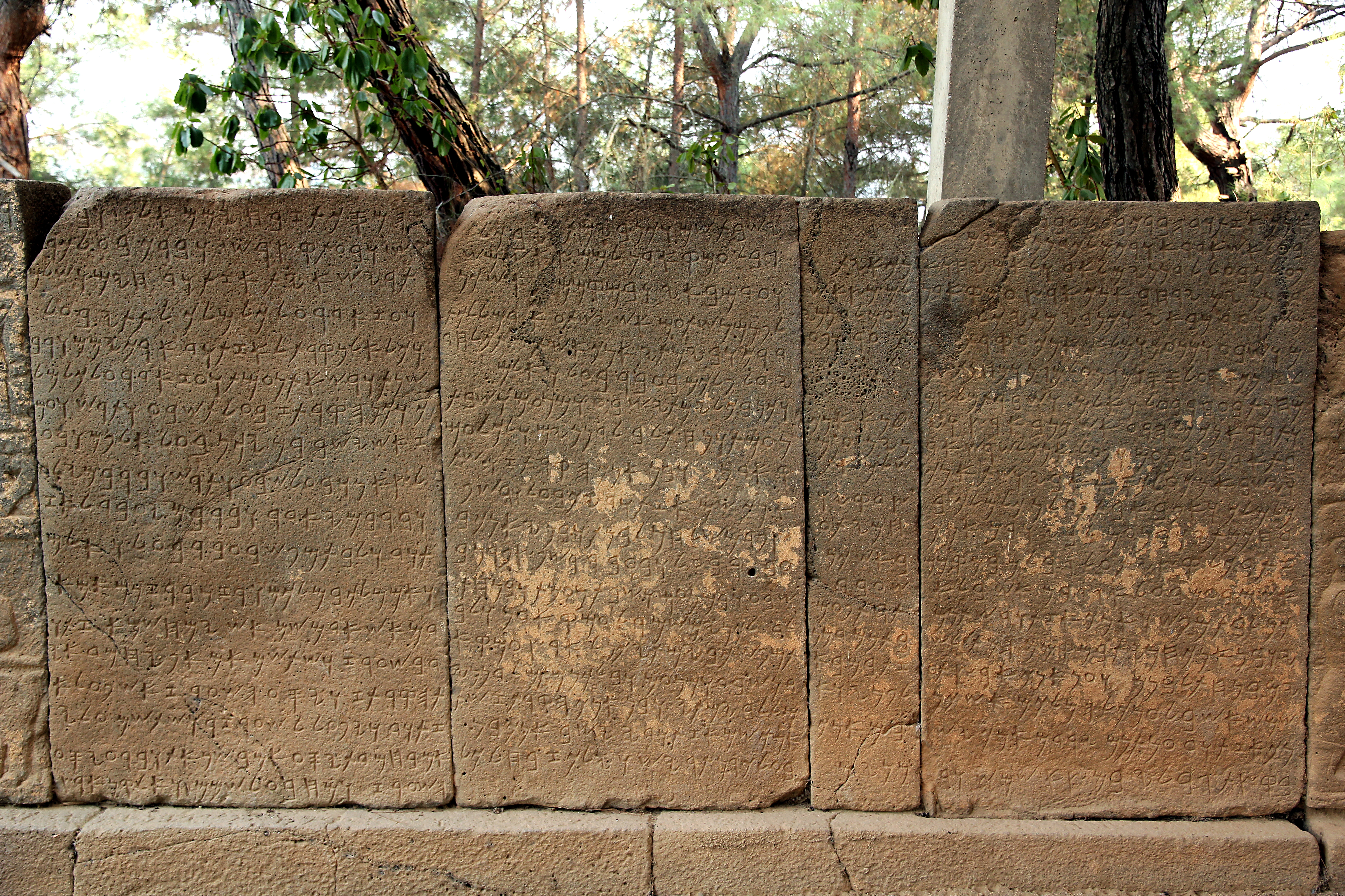 Karatepe (Asatiwataya), neo-hethitischer Fundort bei Osmaniye, Südtürkei, phönizische Schrift, Teil der Bilingue von Karatepe